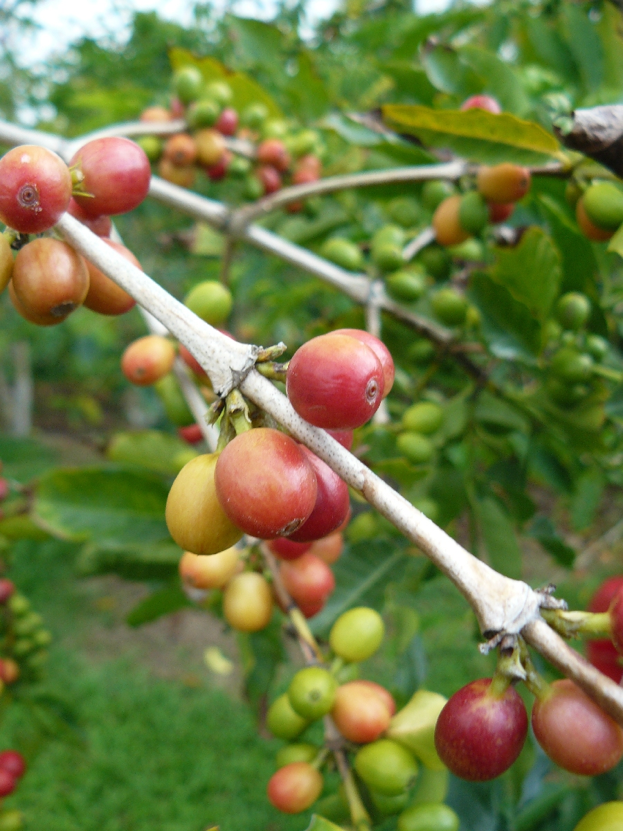 Arabica-Kirschen kurz vor der Kaffee-Ernte in der Region Kona, Big Island, Hawaii